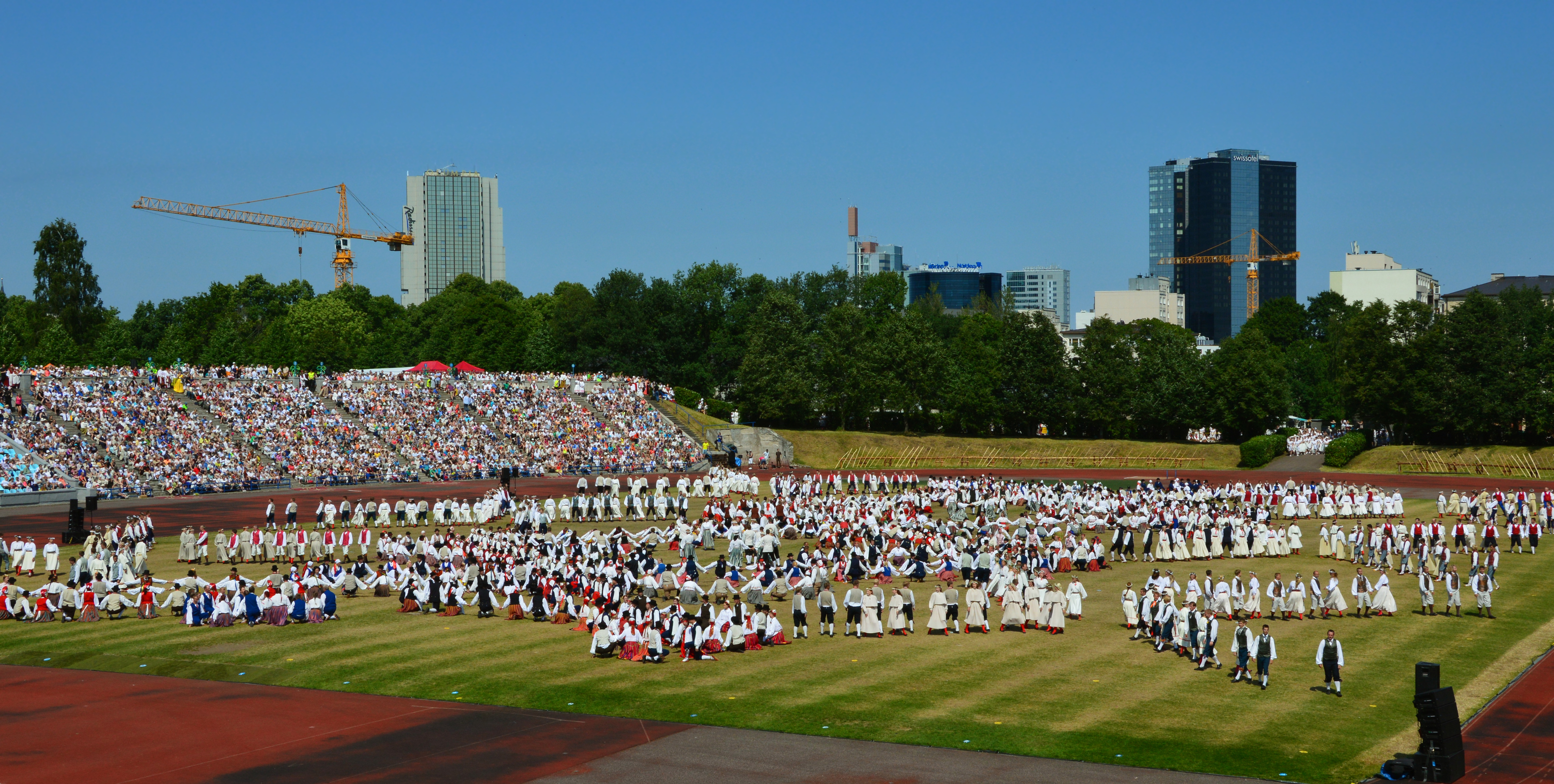 XIX üldtantsupidu Kalevi keskstaadionil.